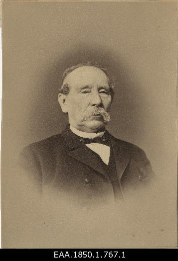 Jacob Reinhold Gustaf (Jacob) von Nasackin, a. Alt-Werpel (Estl.)